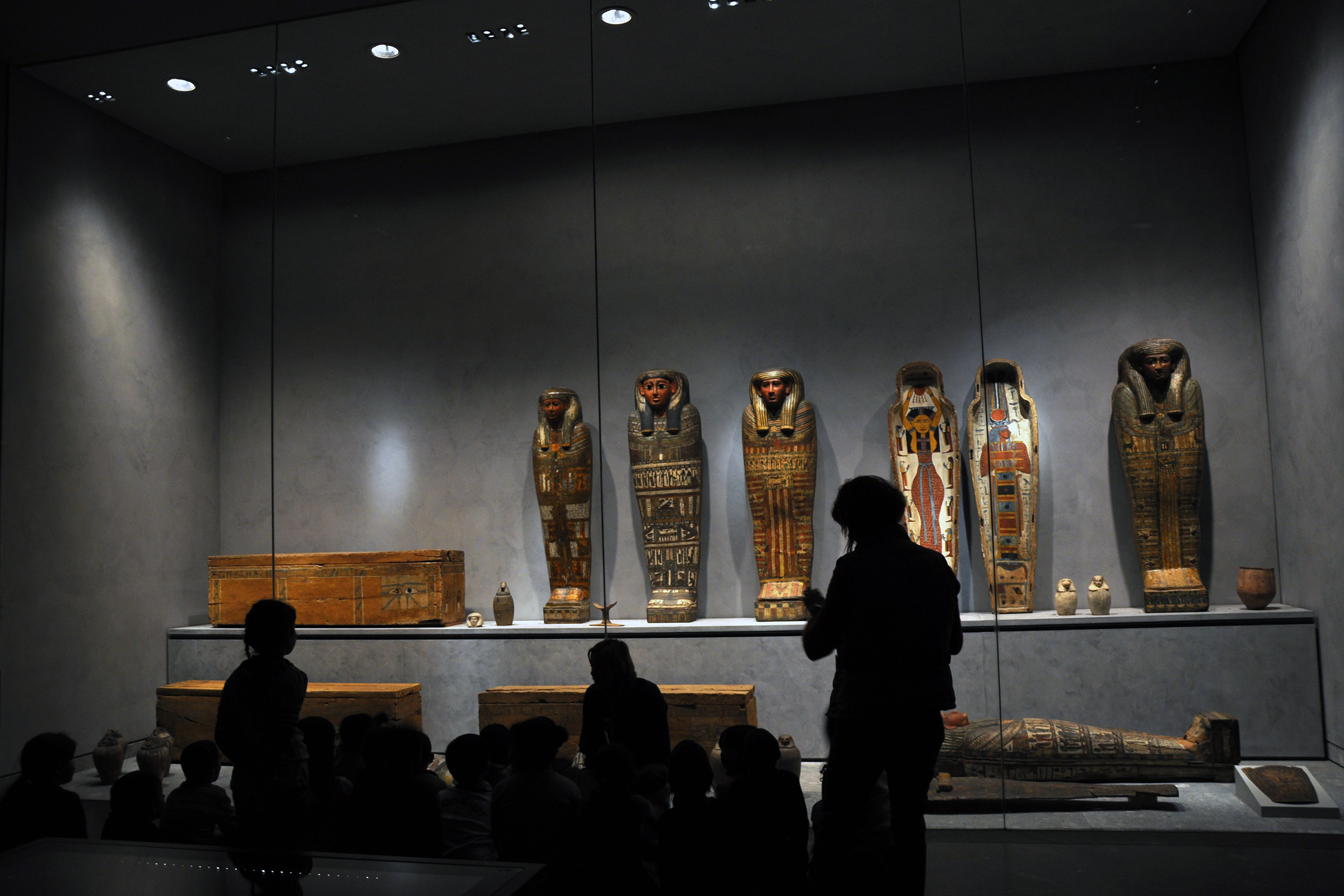 Groupe d'élèves dans une salle du Musée des Beaux-Arts de Lyon.